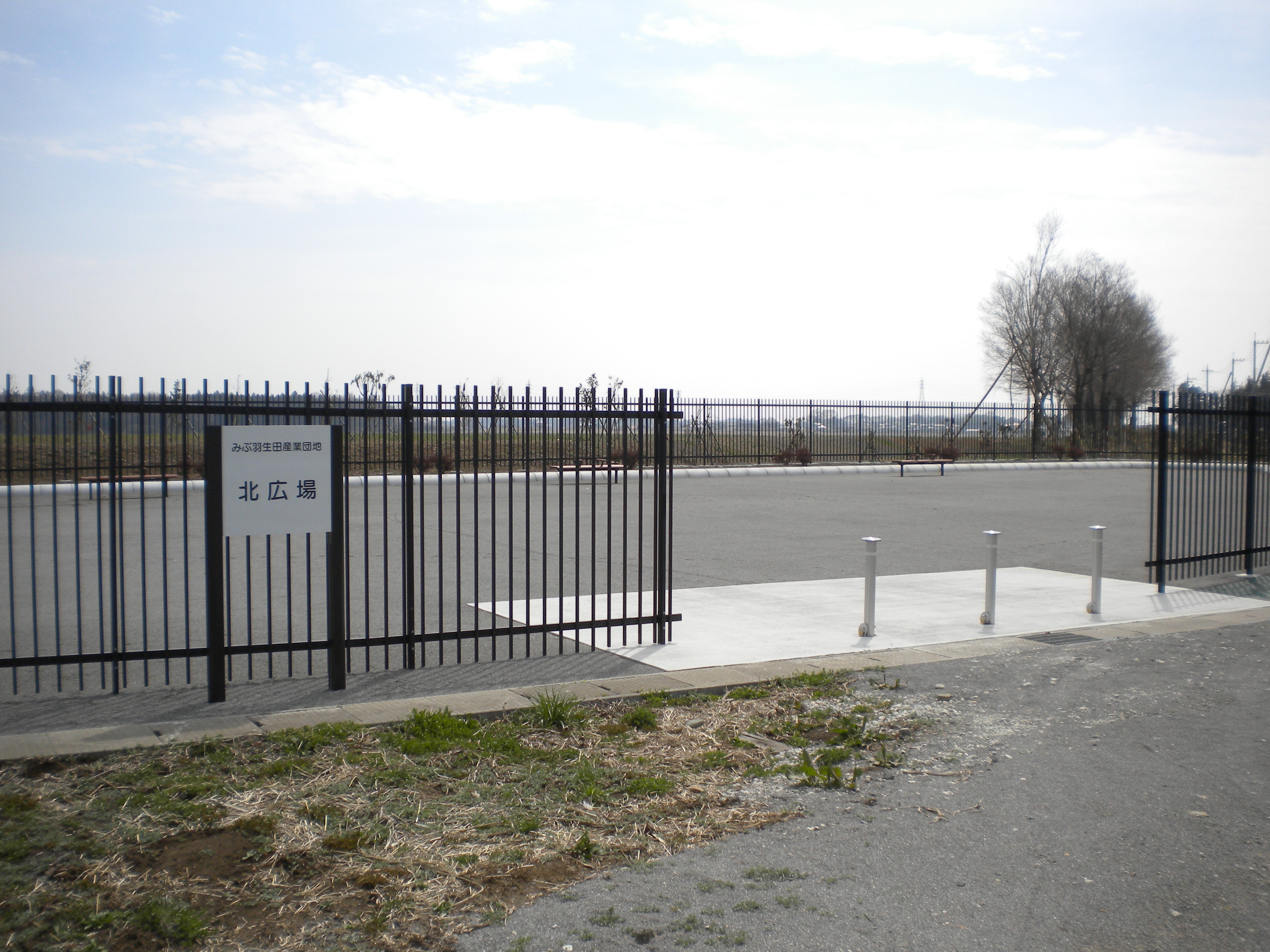 栃木県下都賀郡壬生町みぶ羽生田産業団地 みぶ羽生田産業団地北広場